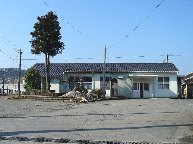 北陸本線 王子保駅 駅舎